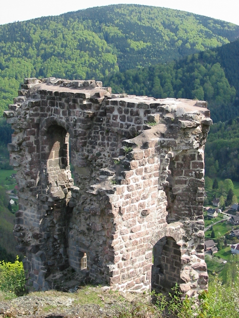 Château du Bilstein lorrain Commune d'Urbeis (Bas-Rhin) Ruines d'un château des Habsbourg (XIIIe siècle) Photographie personnelle, prise le 3 mai 2006 Copyright © Christian Amet